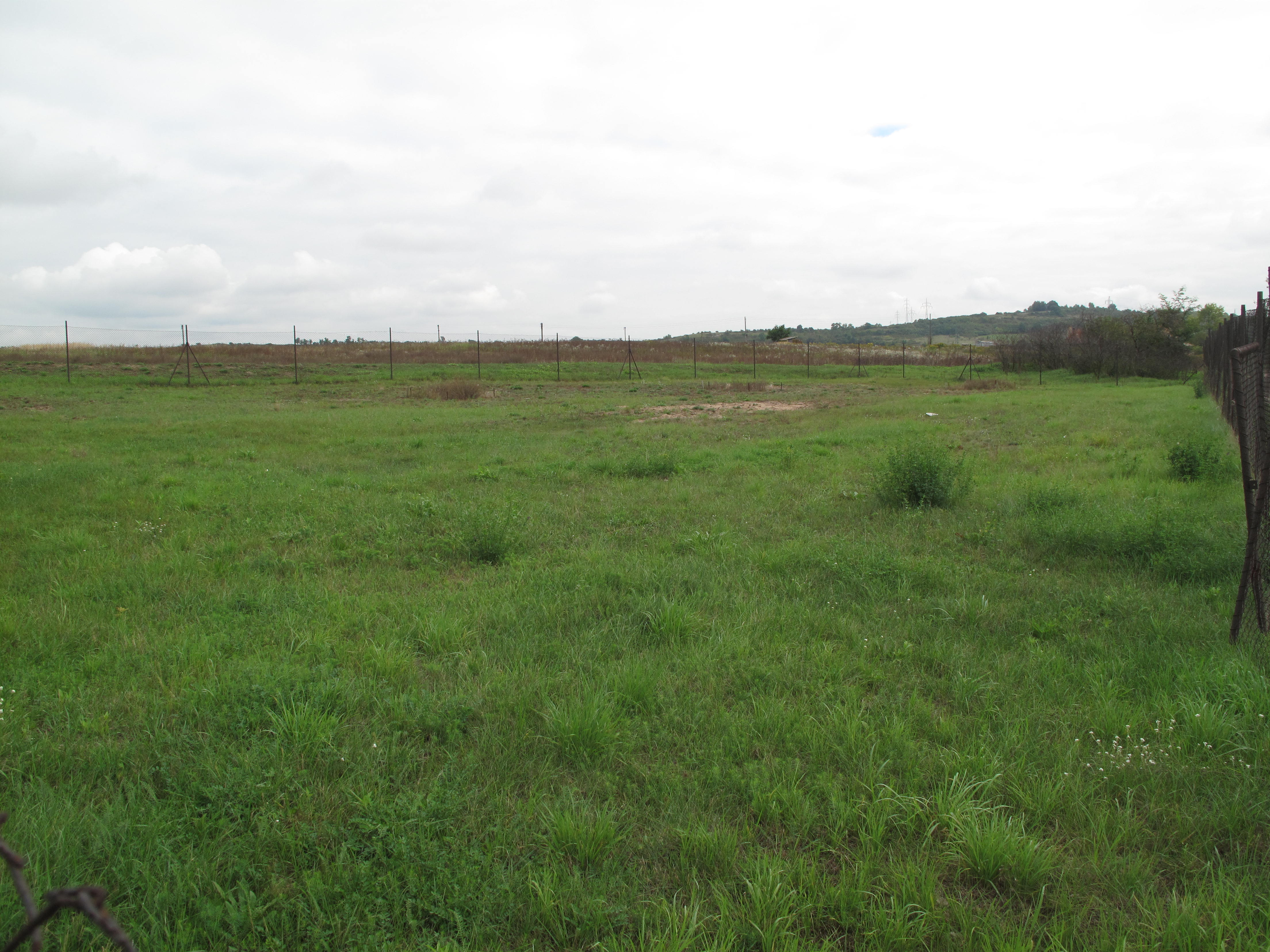 Písčina u Tuhaně